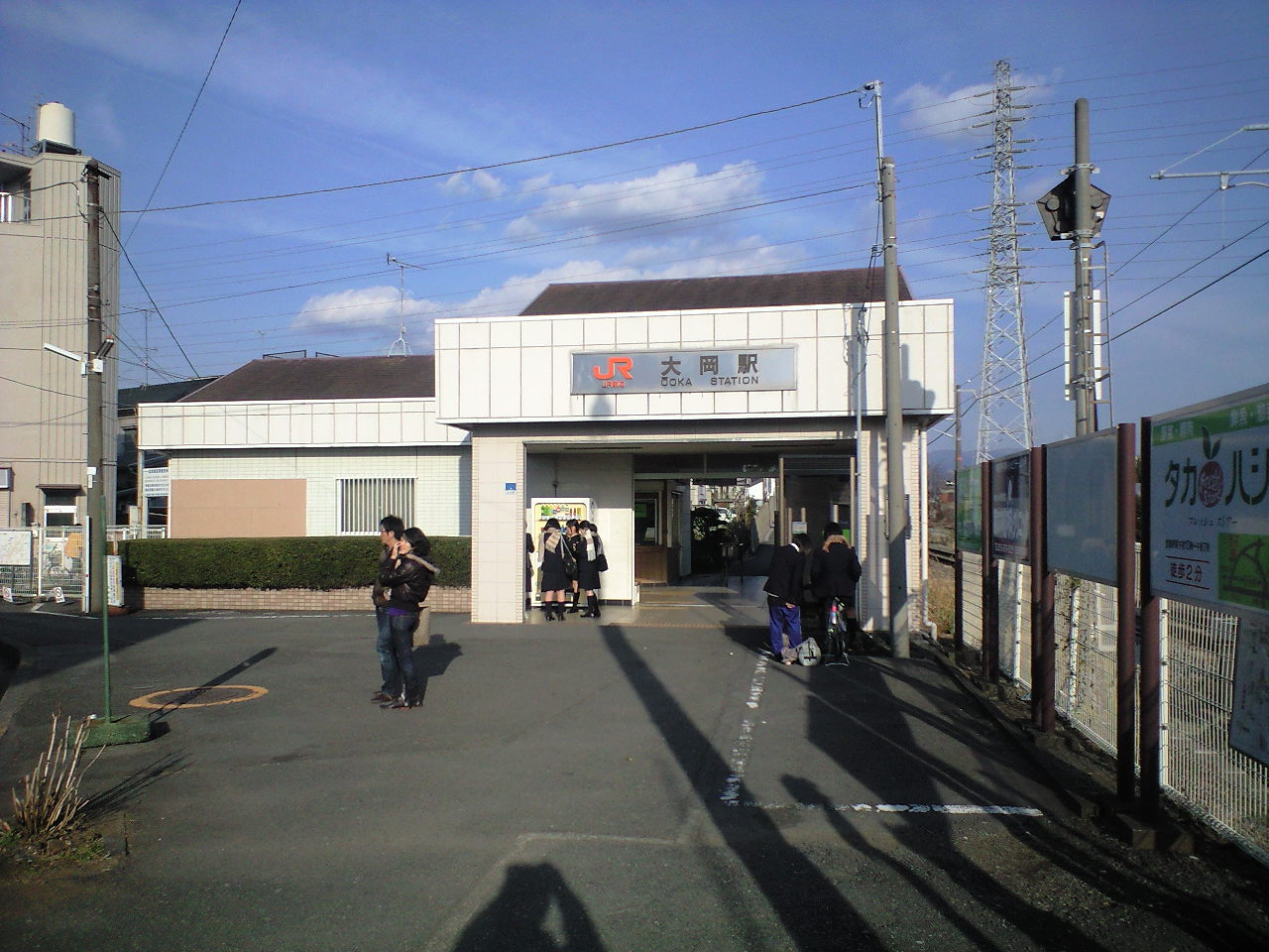 JR東海御殿場線大岡駅駅舎